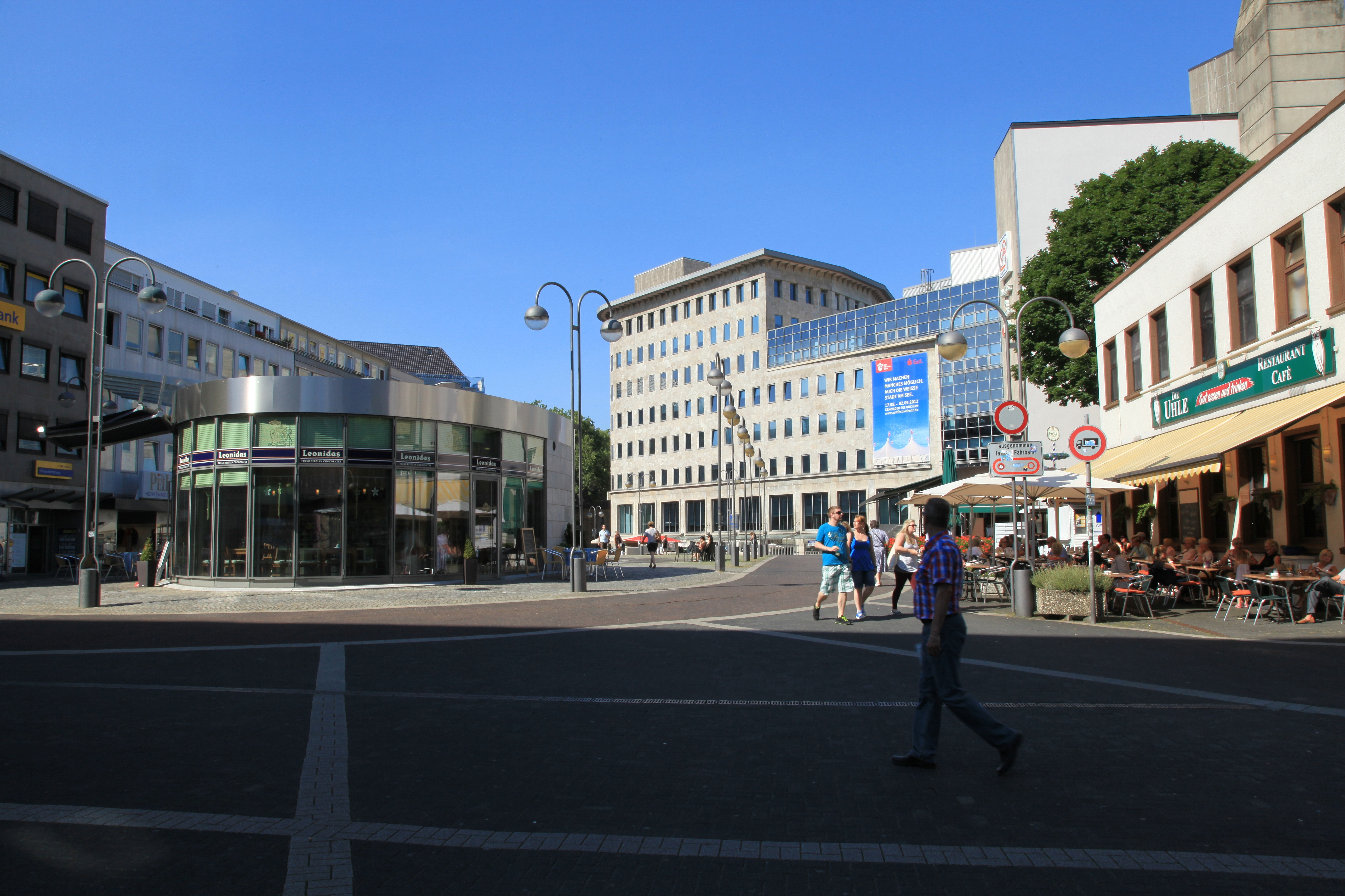 Dr.-Ruer-Platz in Bochum